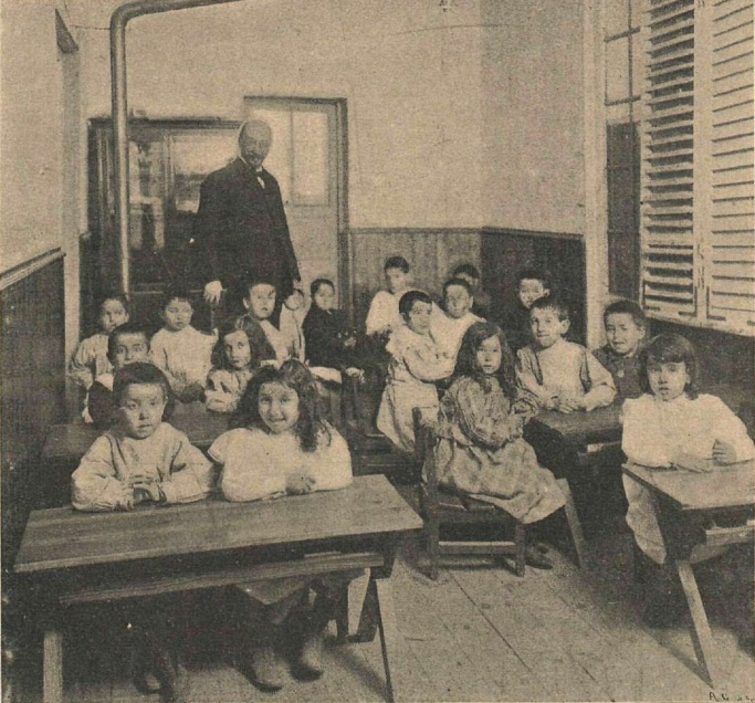 La Canariera, Institución Libre de Enseñanza, obra del fotógrafo Christian Franzen, recogido en la revista Alma Española.